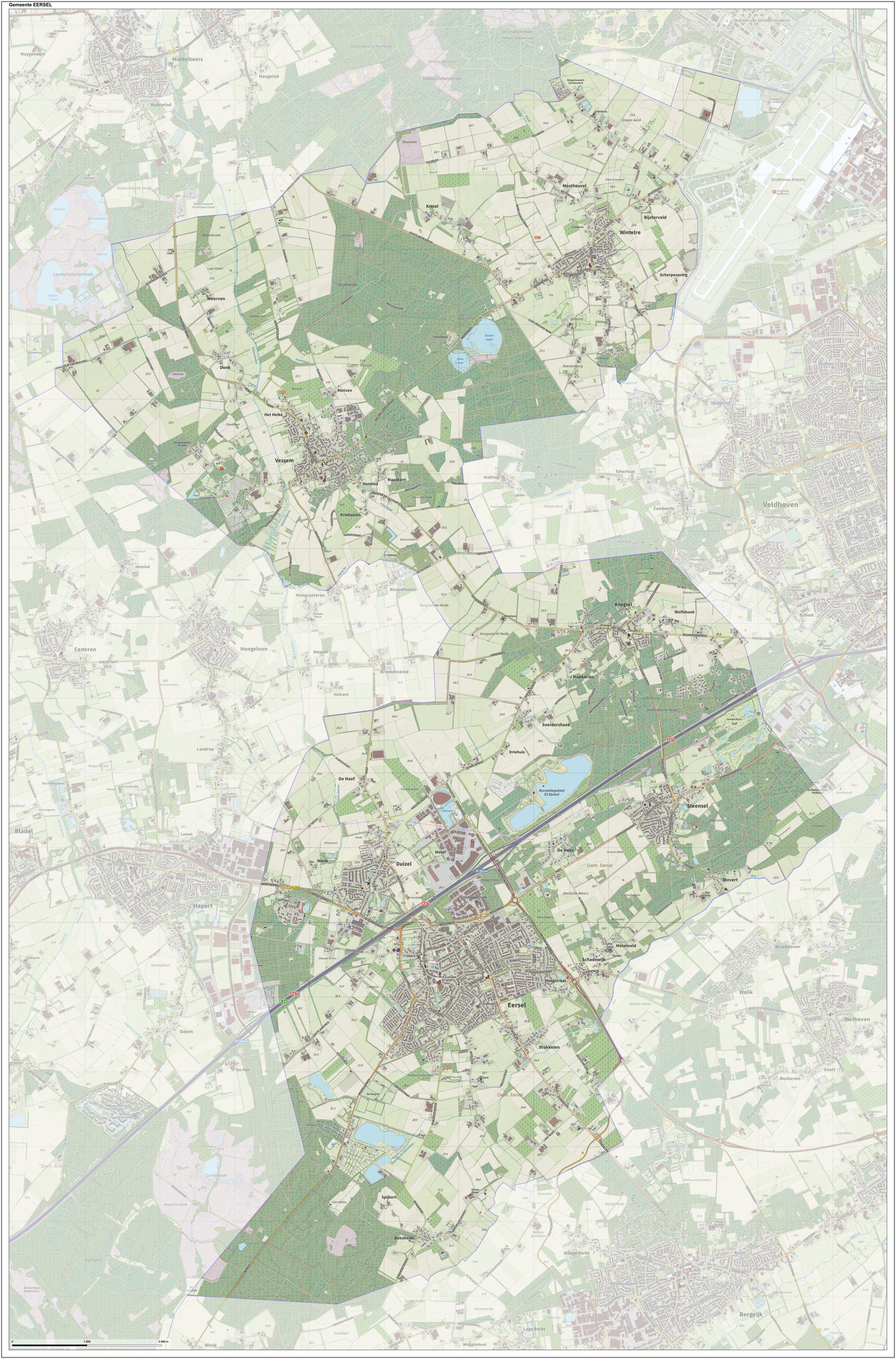 Topografische gemeentekaart. Resolutie: 400 pixels/km. Kaartbeeld samengesteld uit de open geodata van de Top10NL en Top25namen (Kadaster), Creative Commons-BY licentie. Gebouwvlakken uit open geodata BAG extract. Wegen uit de OpenStreetMap, OpenStreetMap community. Reliëfschaduw uit de Actuele Hoogtekaart AHN2. Samenstelling en kleurenschema: Jan-Willem van Aalst, met QGIS. Zie ook de Legenda.